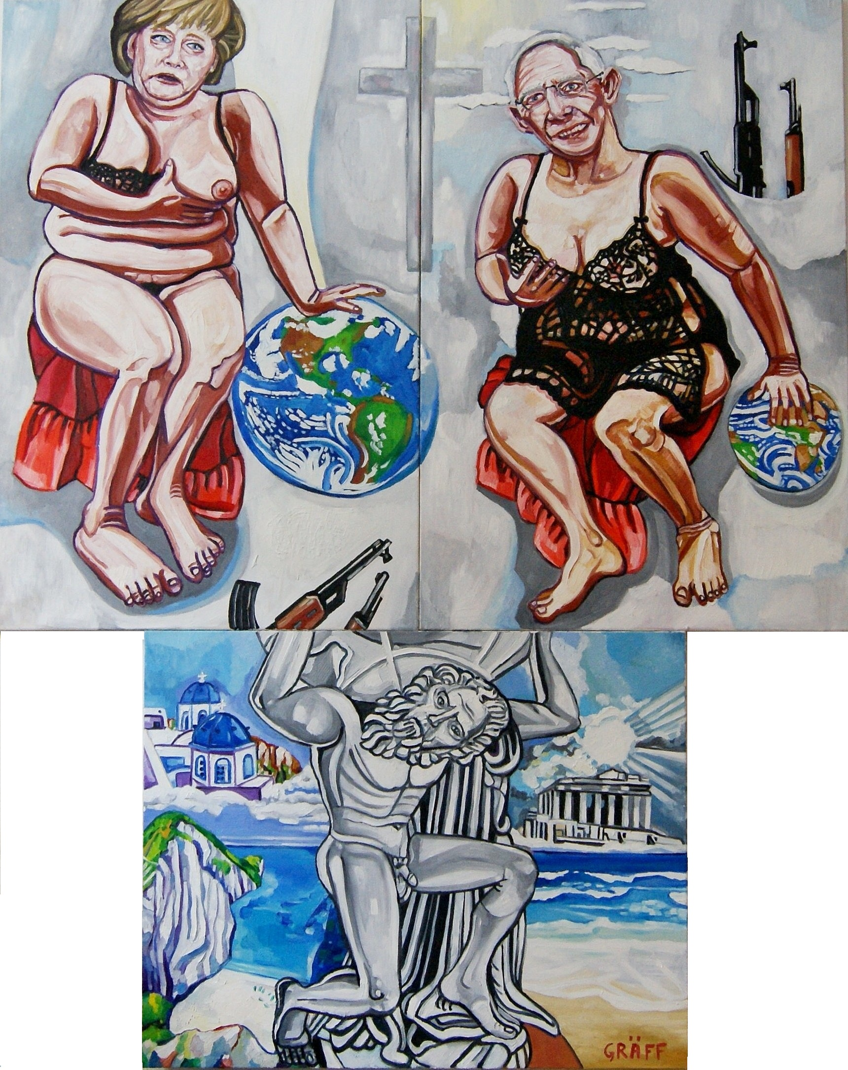 Matthias Laurenz Gräff, Triptychon "Der griechische Altar. Merkel und Schäuble als falsche Caritas", Öl auf Leinwand, 120x80 / 80x100 cm / 120x80 cm cm, Matthias Laurenz Gräff 2015